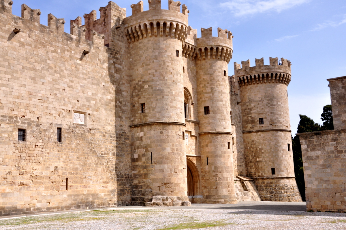 Rodos (Grecja), Pałac Wielkich Mistrzów, brama budynku głównego